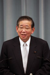 Minister Jirō Kawasaki.